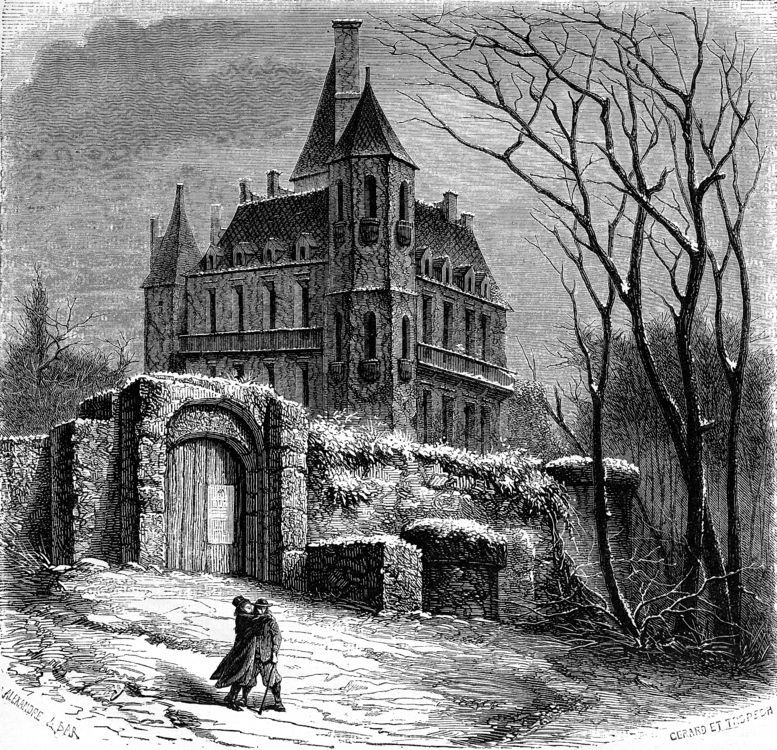 Ilutrace k románu Julesa Verna Hrabě de Chanteline